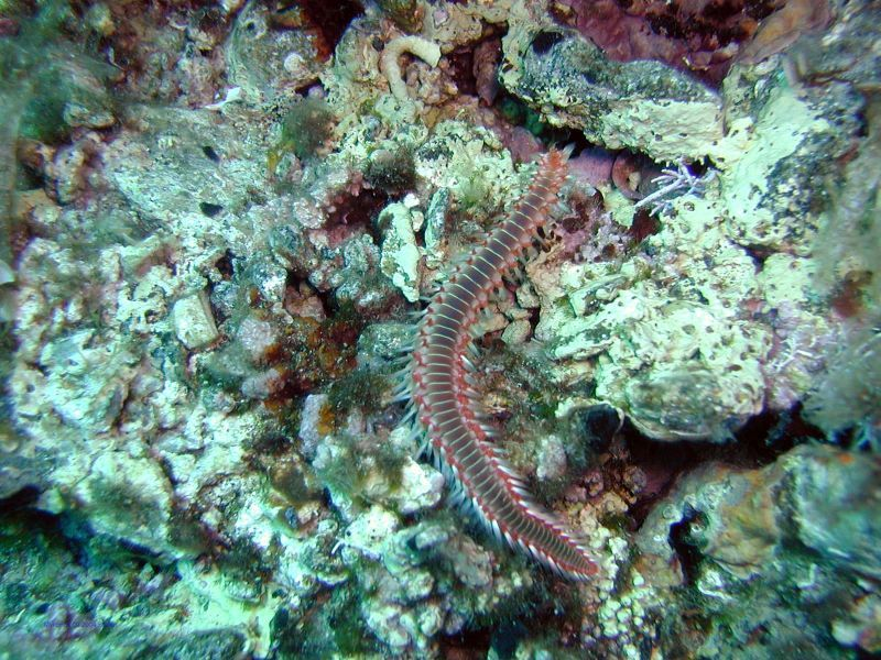 Feuerwurm südlich von Mykonos